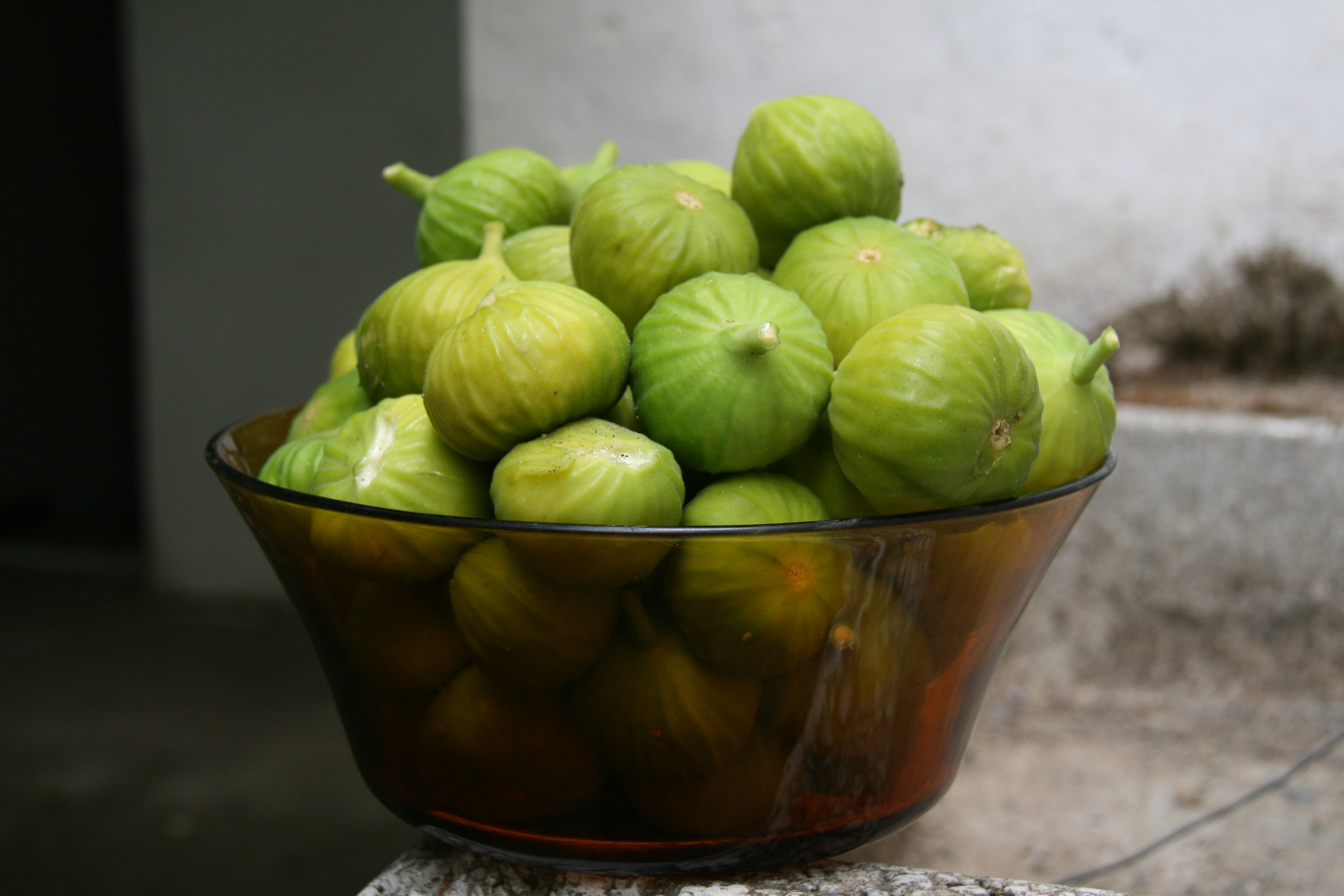 Feigen in einer Glasschale